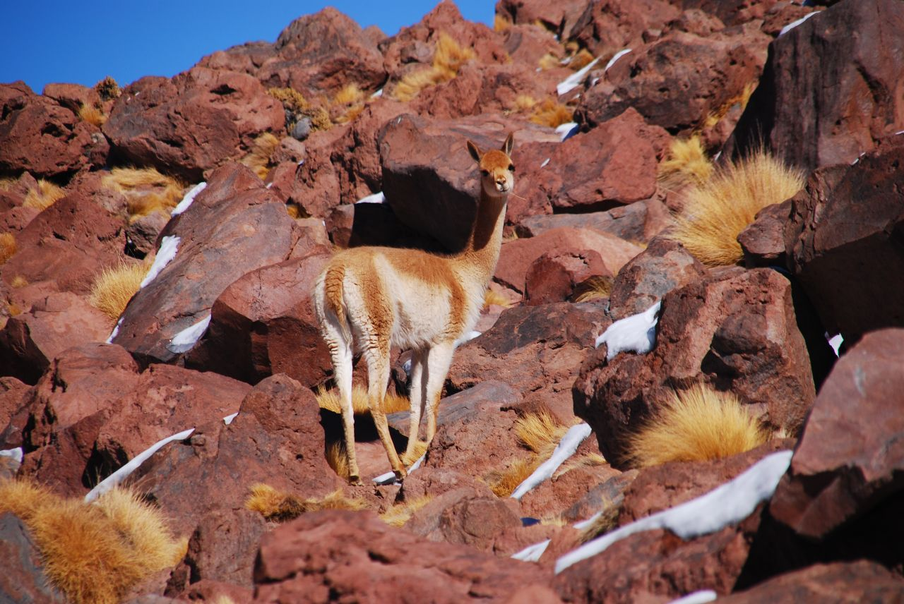 La vicuña (Vicugna vicugna), —del quechua wik'uña— es un camélido sudamericano de la tribu lamini que vive en el altiplano andino sudamericano, en los actuales territorios del sur del Perú, parte de Bolivia, norte de Chile y noroeste de Argentina. La principal población de este camélido sudamericano, se encuentra en el Perú.